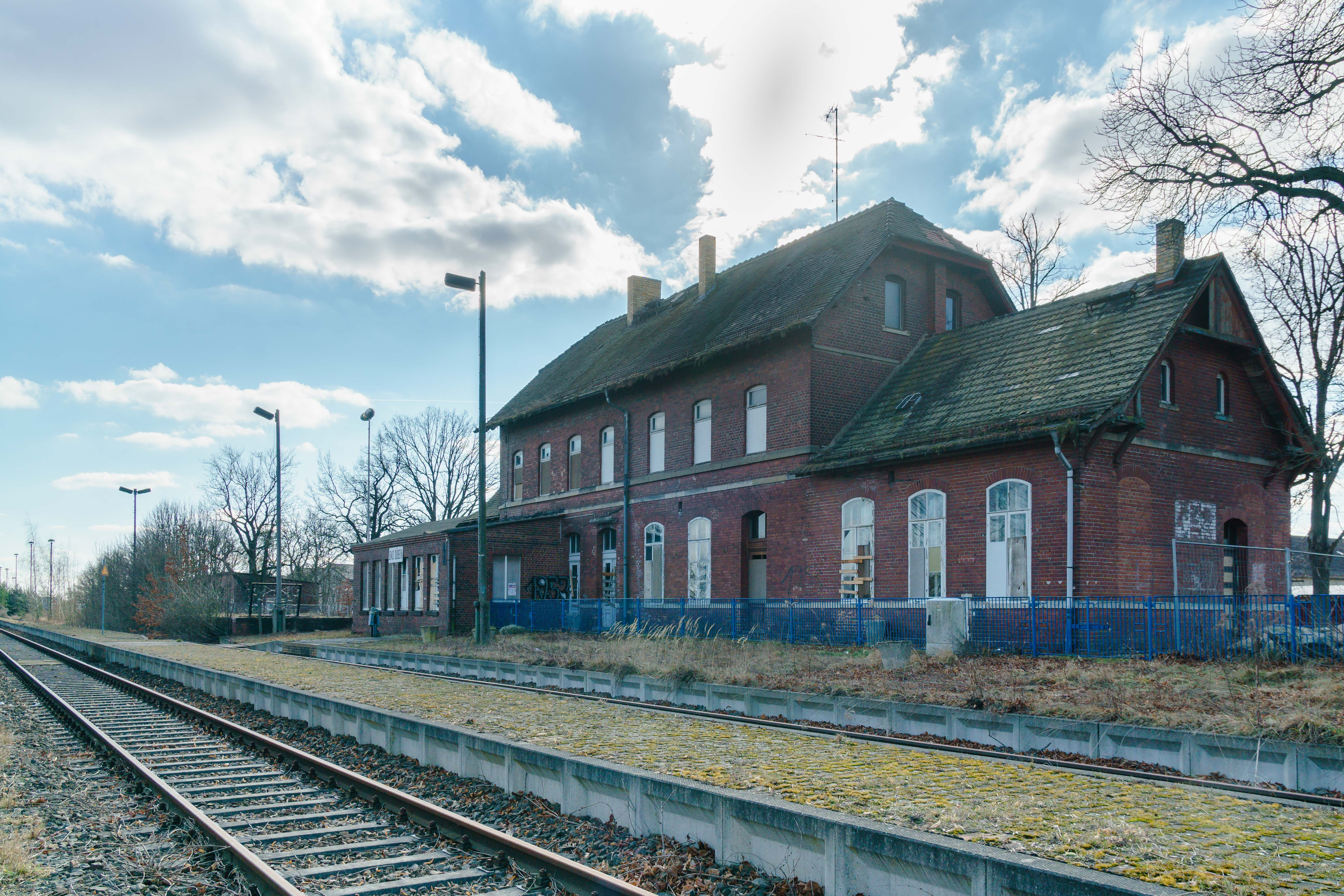 Empfangsgebäude, Bahnhofstraße 3 in Bad Düben